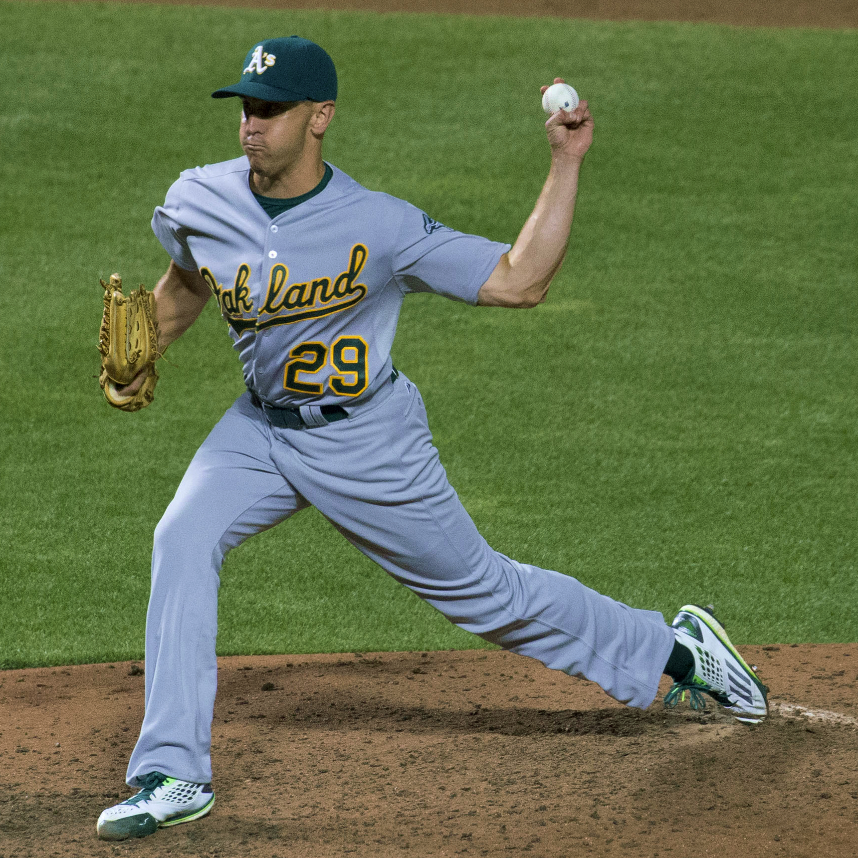 Pat Venditte